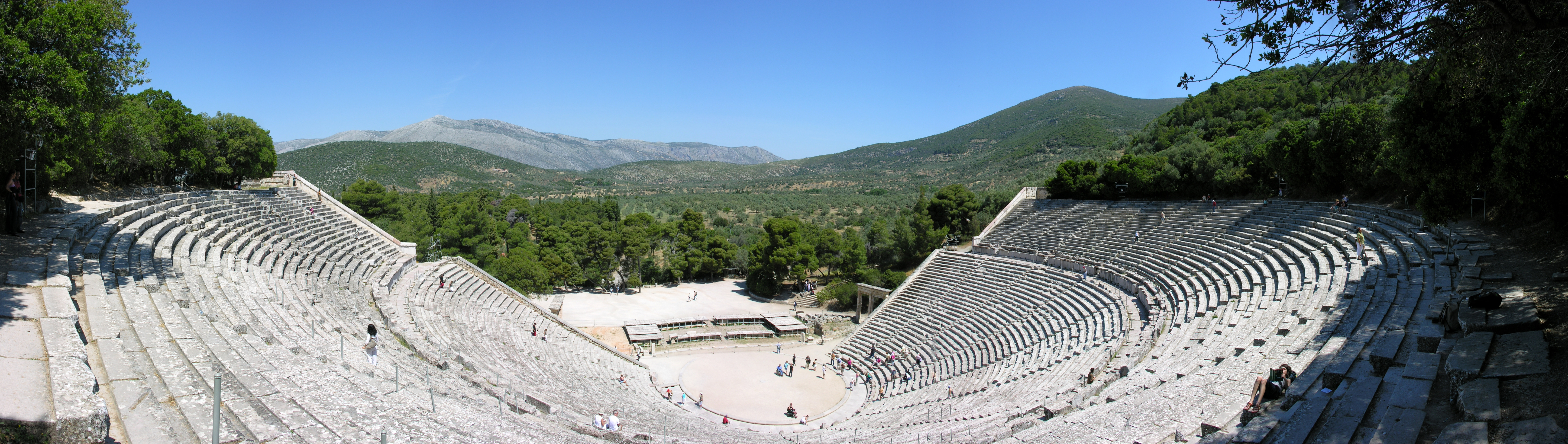 Epidauros